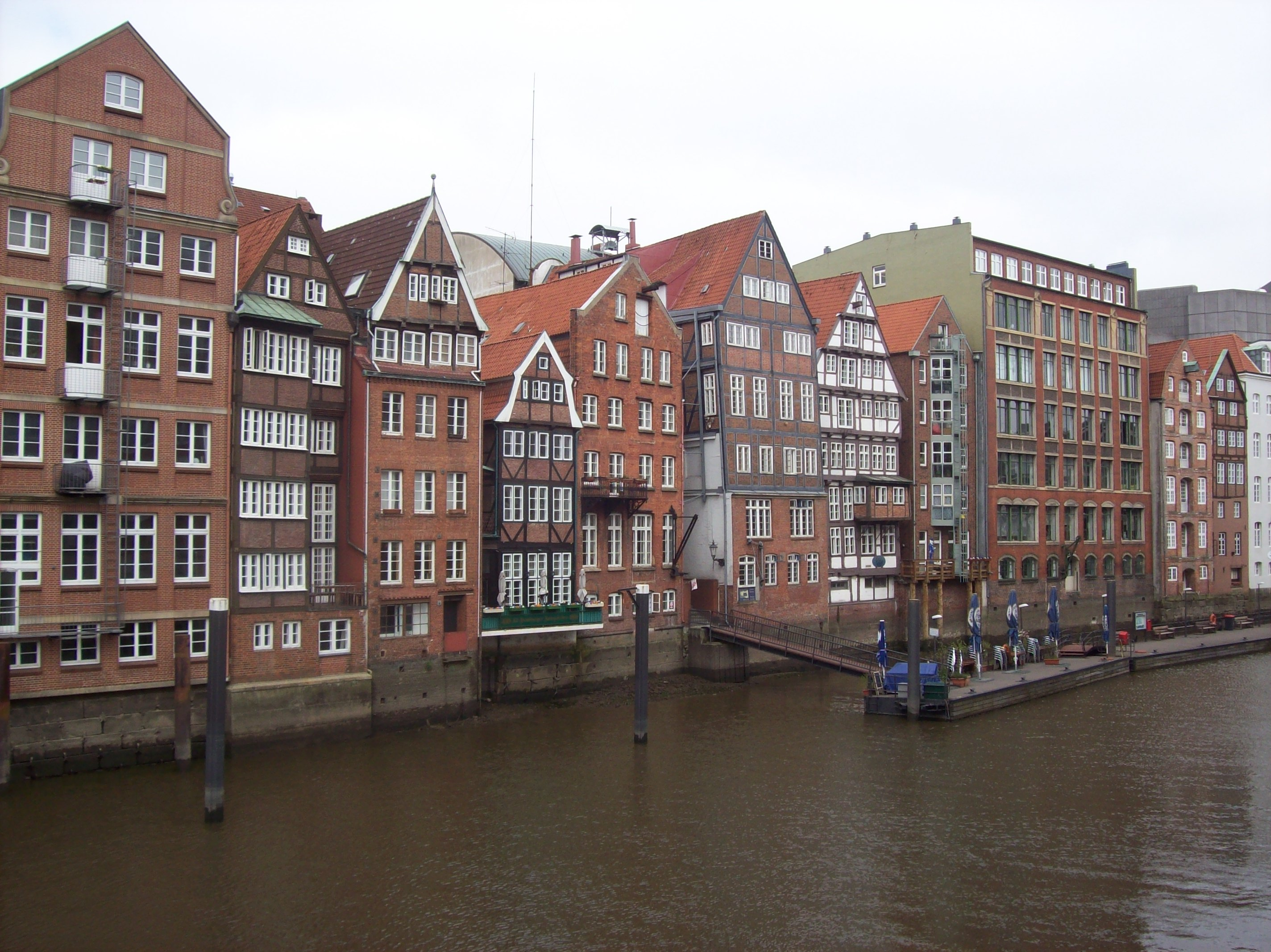 Sicht von der Hohe Brücke auf die historischen Kontor.- und Bürgerhäuser der Deichstraße. Die Pontons im Nikolaifleet gehören zu den Gastronomiebetrieben. Die Deichstraße ist als Gesamt-Ensemble in der Hamburger Denkmalliste unter der Nr.29970 aufgeführt, die einzelnen Häuser sind extra aufgeführt. This is a photograph of an architectural monument.